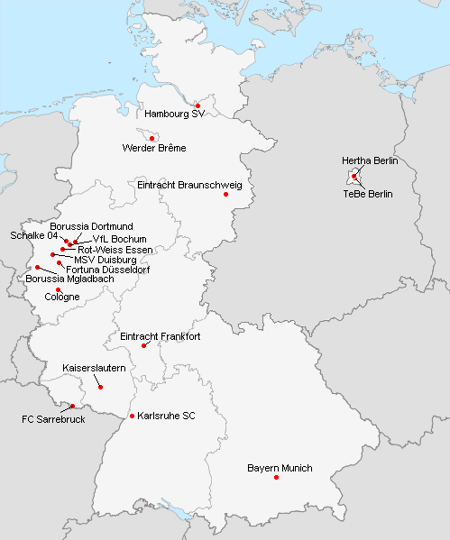 Répartition des clubs en 1.Bundesliga 1976-1977.